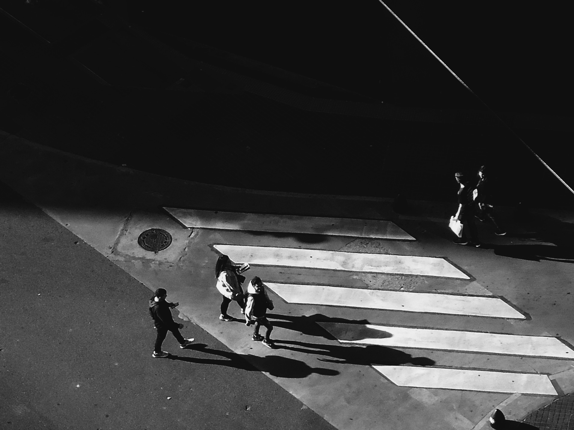 Tocaba la última luz del día, la gente caminaba por debajo del edificio Bencich